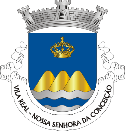 Brasão da freguesia de Nossa Senhora da Conceição (concelho de Vila Real)